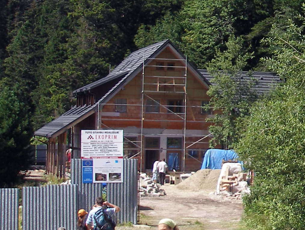 Popradské pleso vo Vysokých Tatrách.